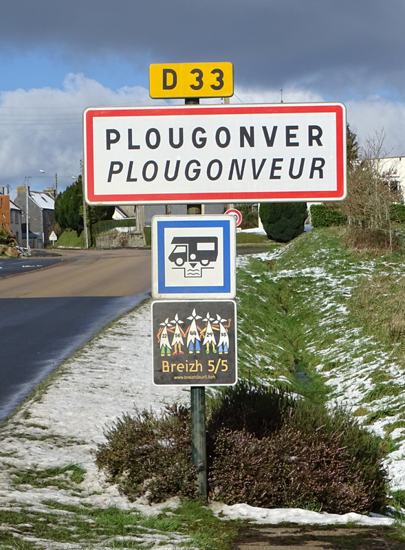 Plougonveur. Pannell hent